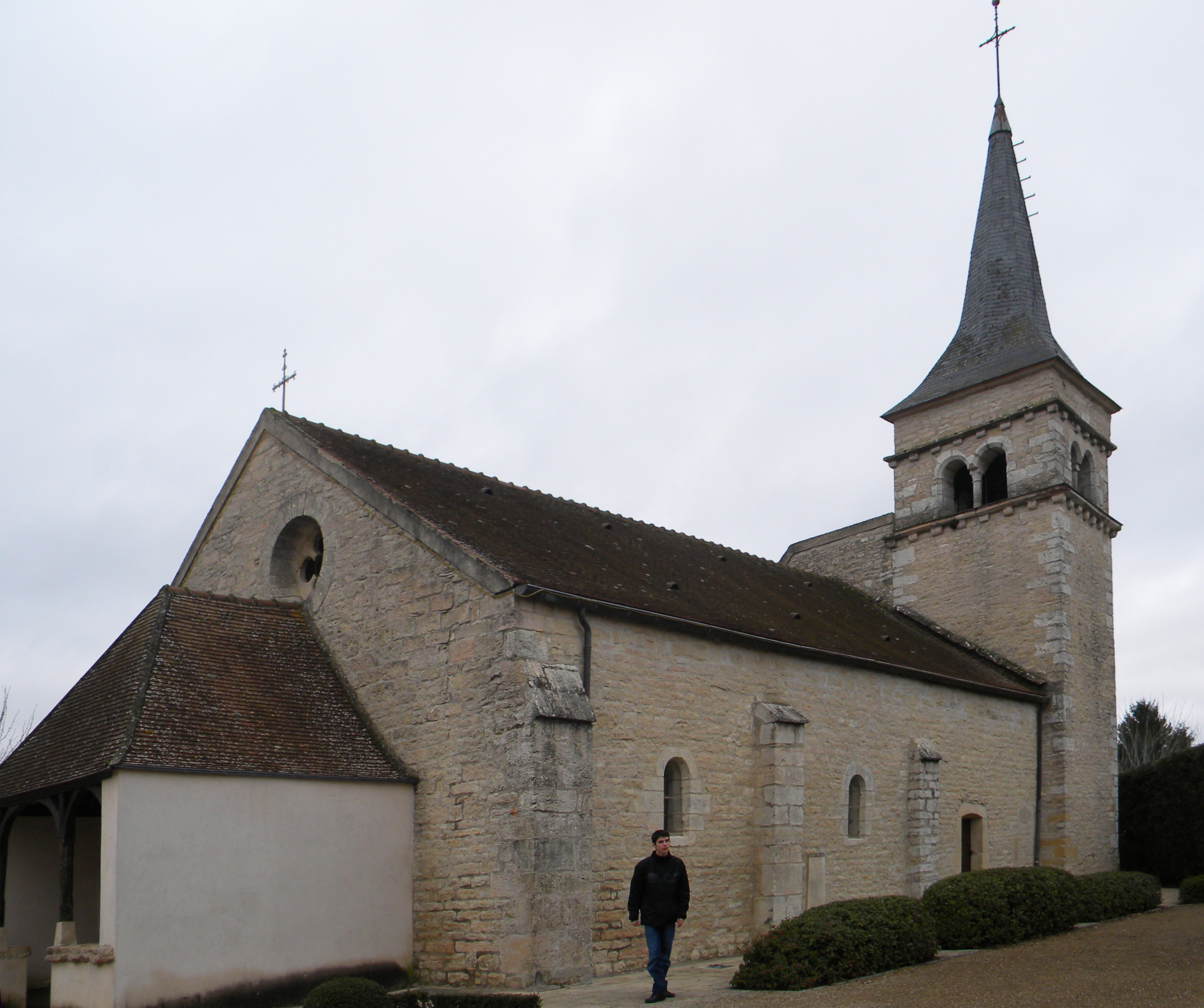 Kirko de Levernois